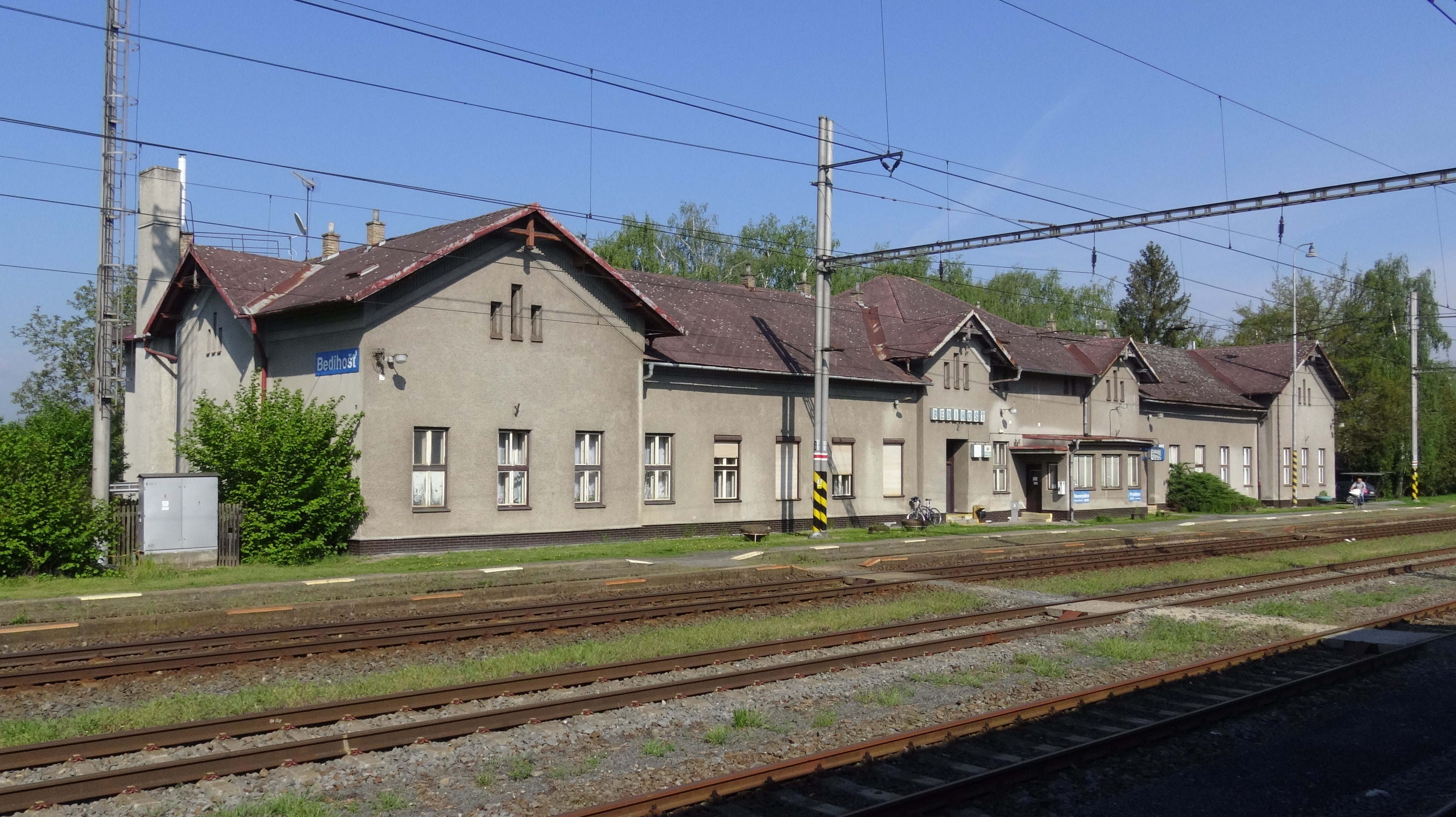 ranní pohled